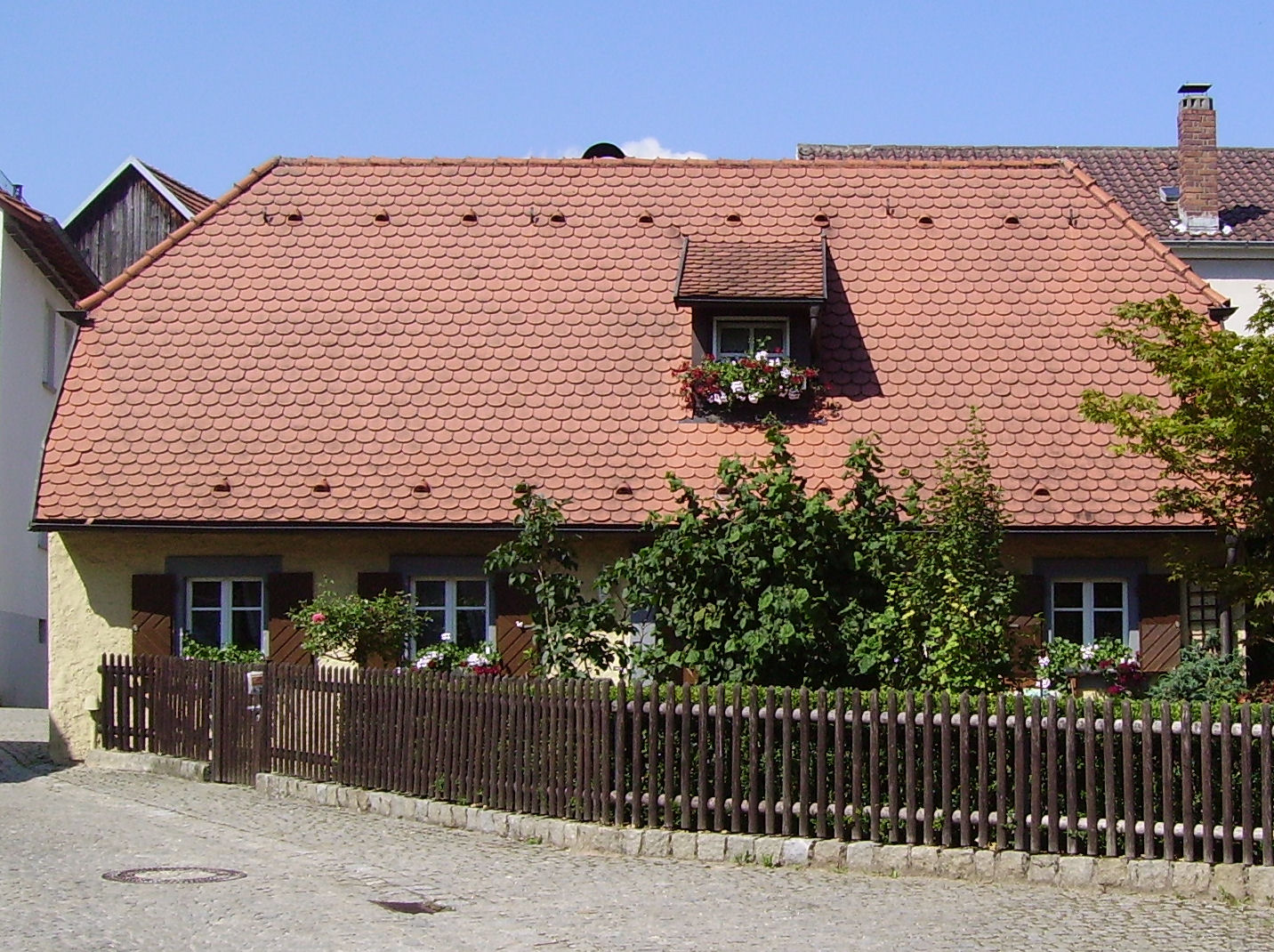 Heiligenstadt in (Franconia)